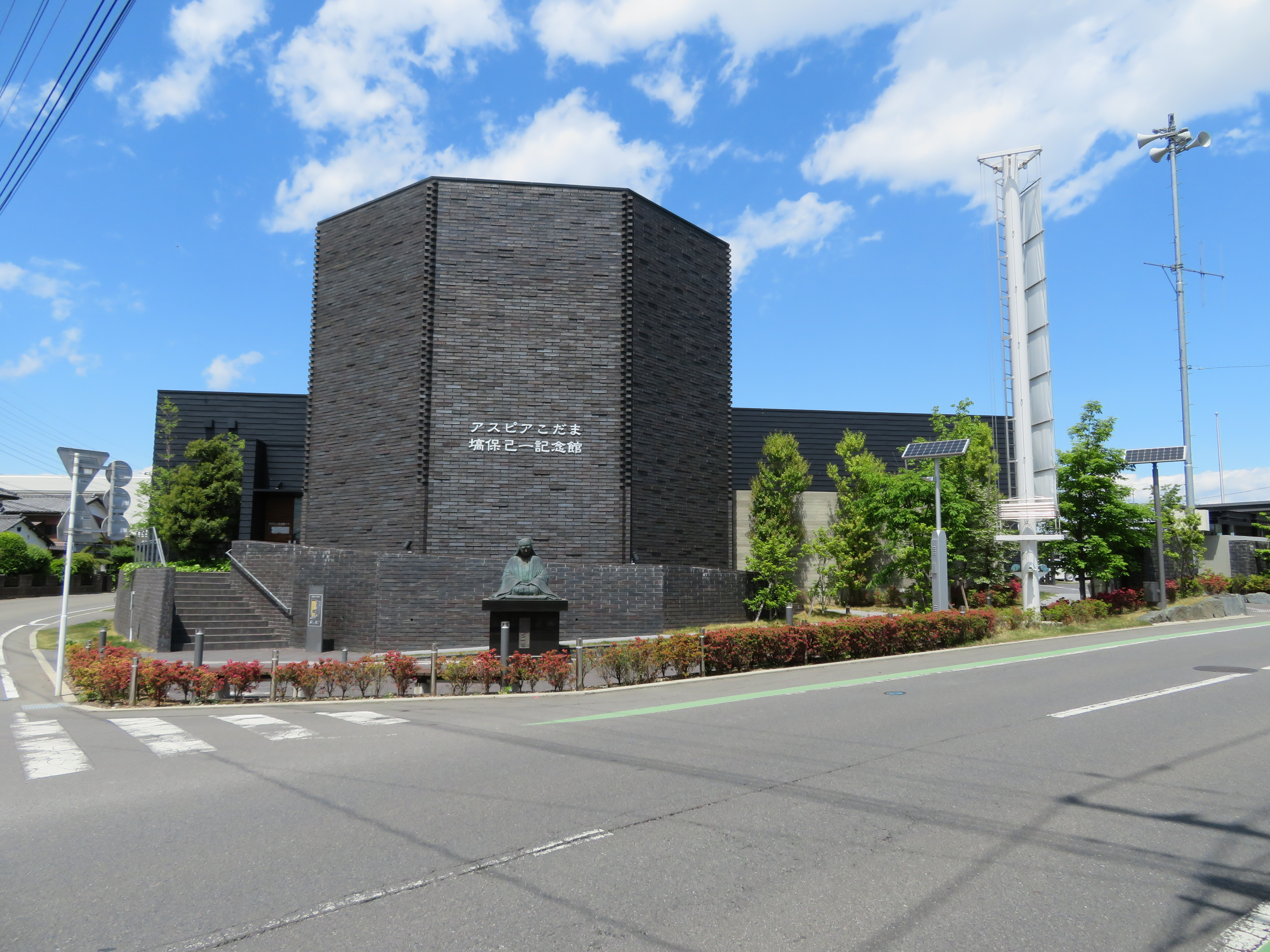 埼玉県本庄市児玉町にあるアスピア児玉（塙保己一記念館） Canon PowerShot SX720 HS